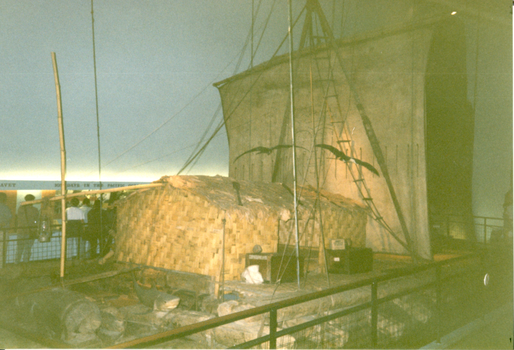 Kon Tiki raft